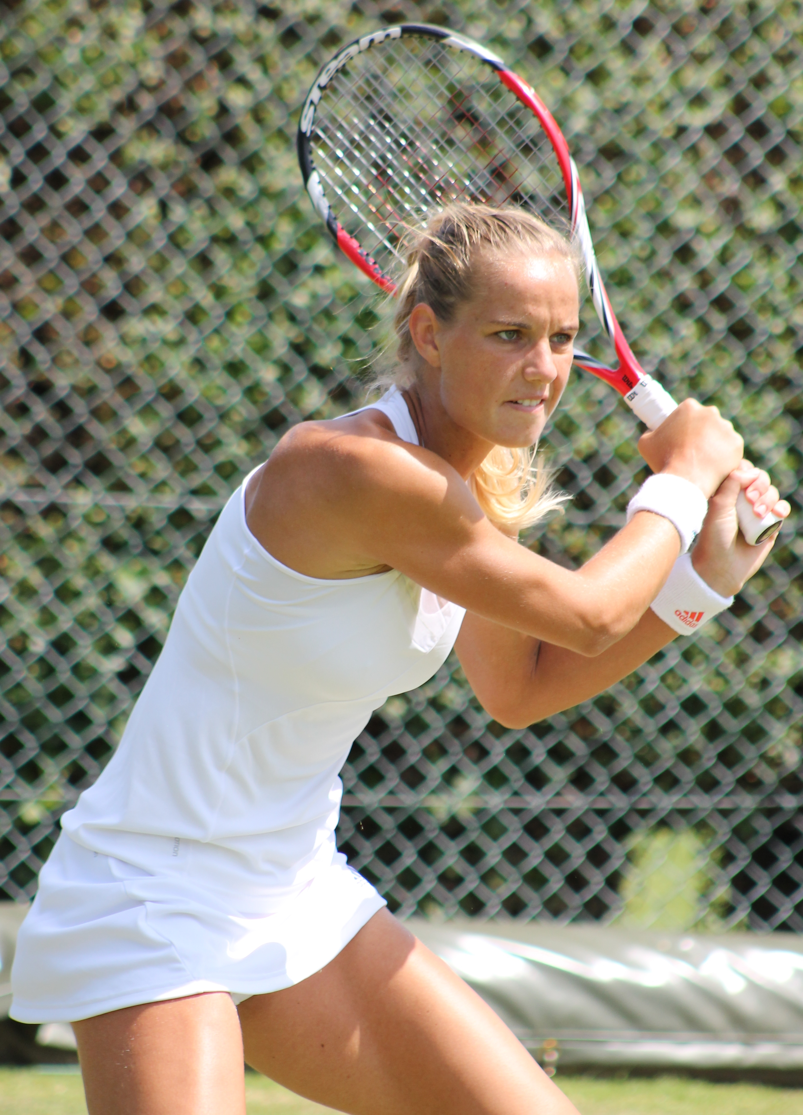 Rus WMQ14 (14)